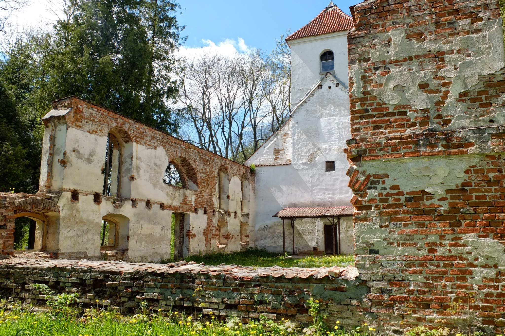 Kobułty - kościół ewangelicki - ruina